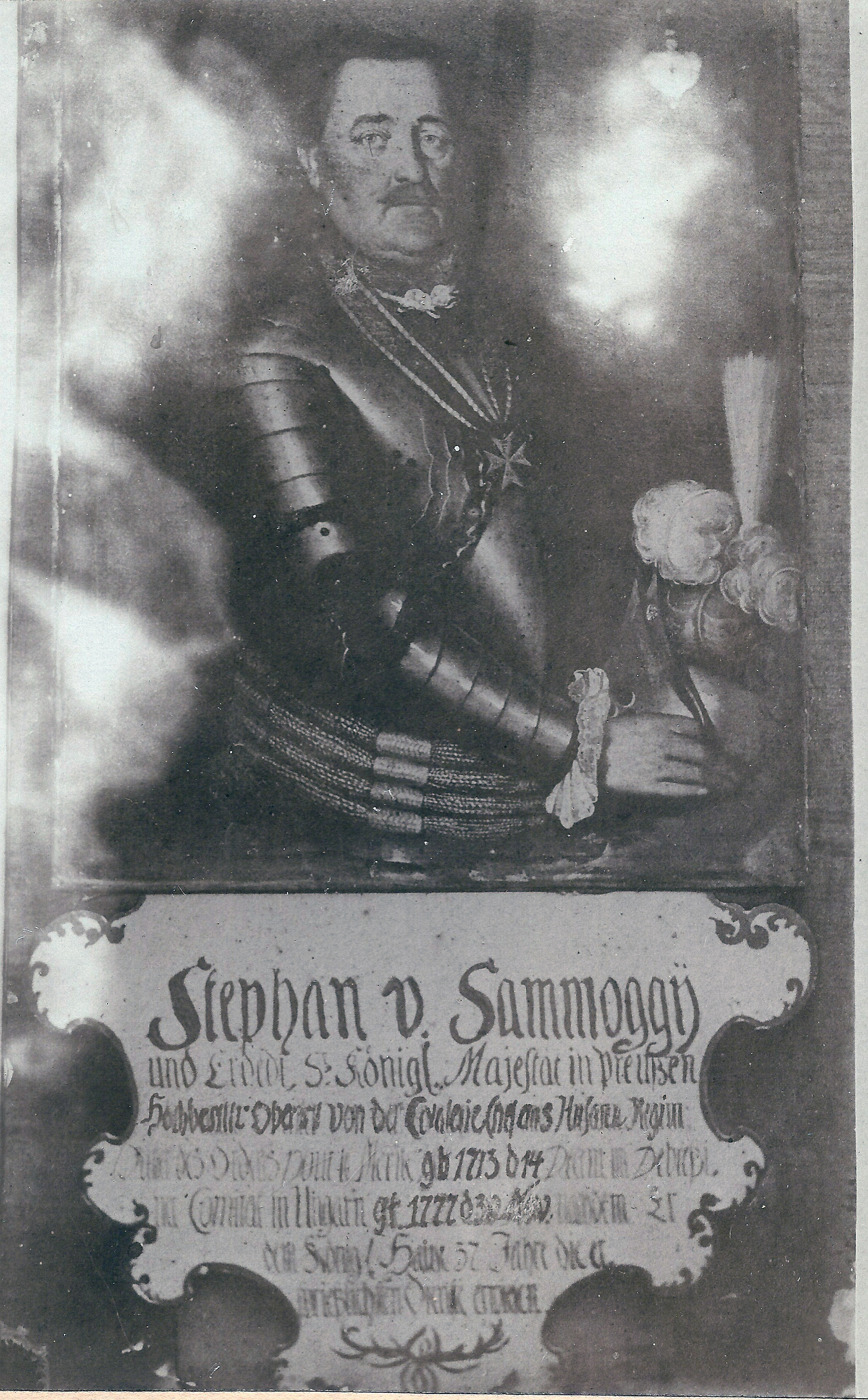 Oberst Stephan von Somoggy